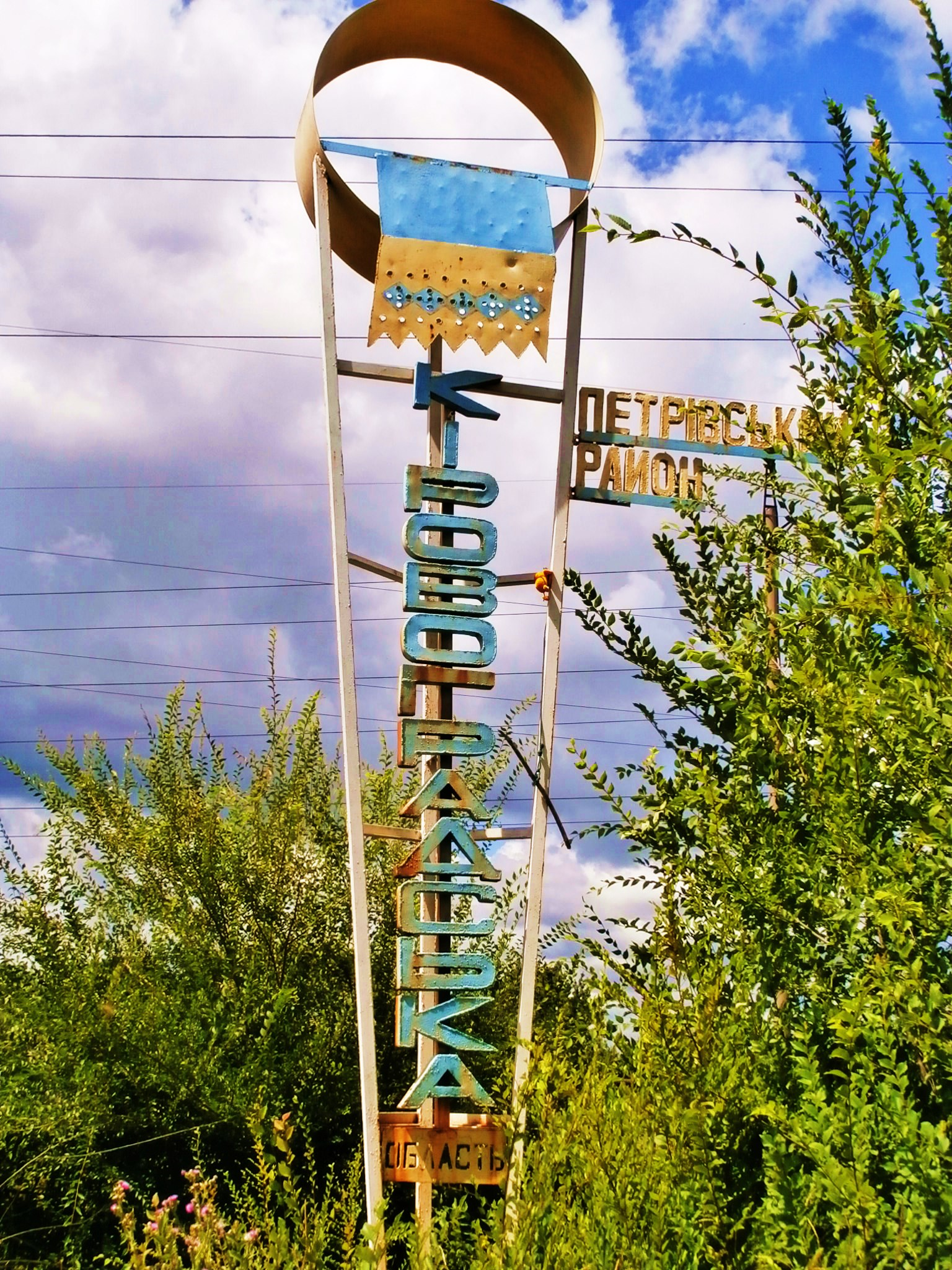 Grenzschild Oblast Kiroworad Rajon Petrowe